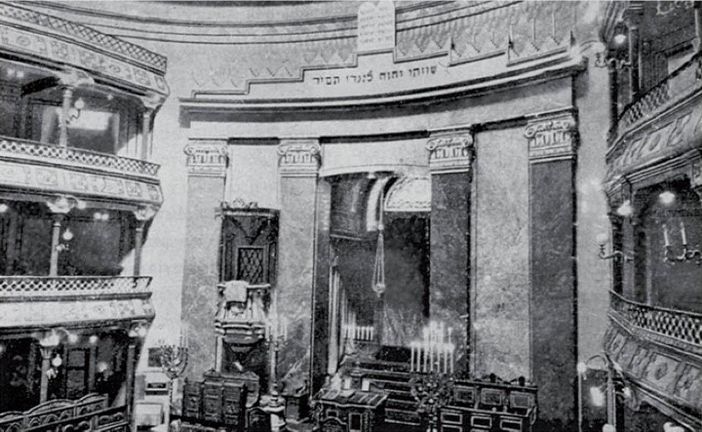 Синагога Темпль у Львові, 1846.